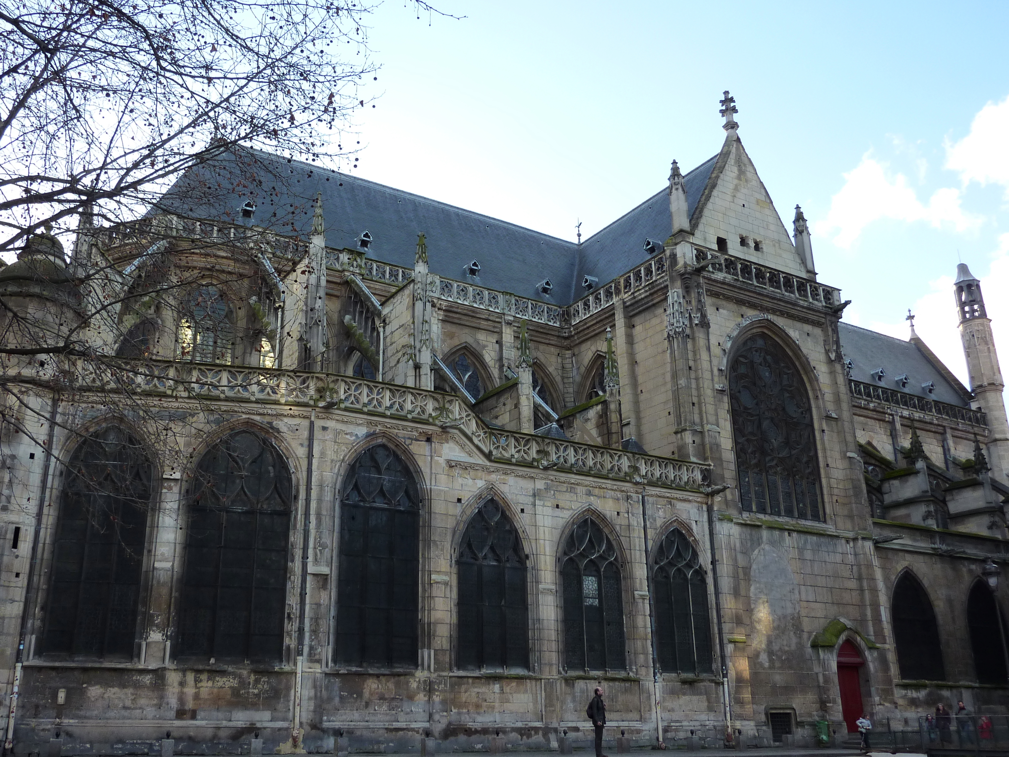 Katholische Pfarrkirche Saint-Merry im 4. Arrondissement in Paris